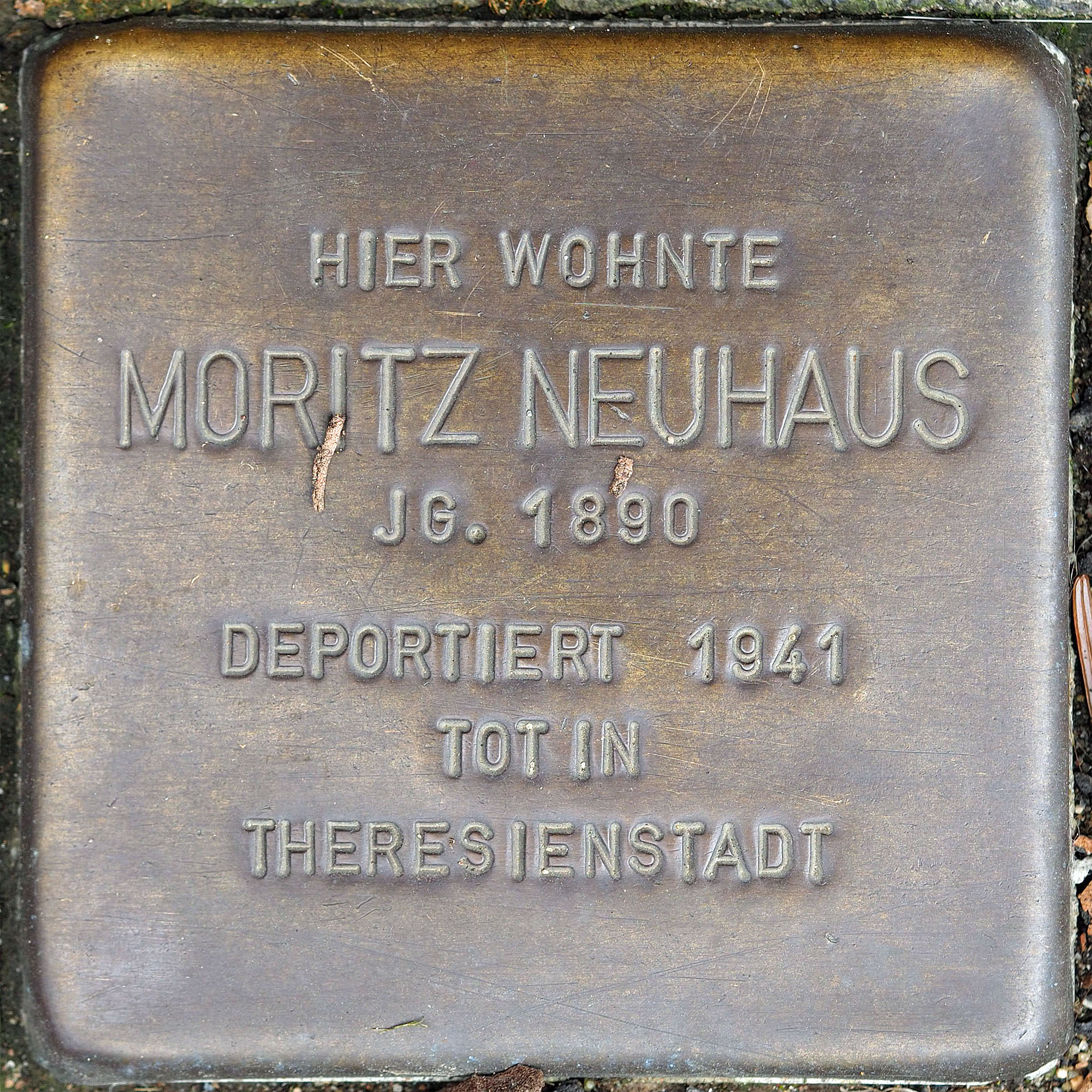 Stolpersteine Korschenbroich: Neuhaus, Moritz